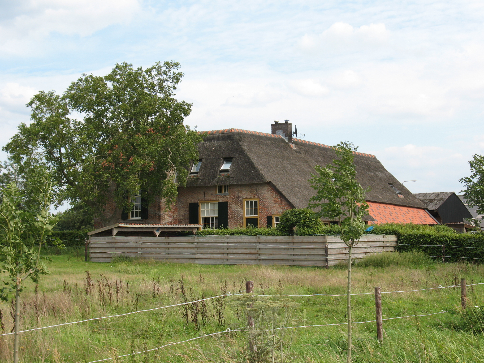 De Harn - Harnsedijkje 2a Bennekom rijksmonument